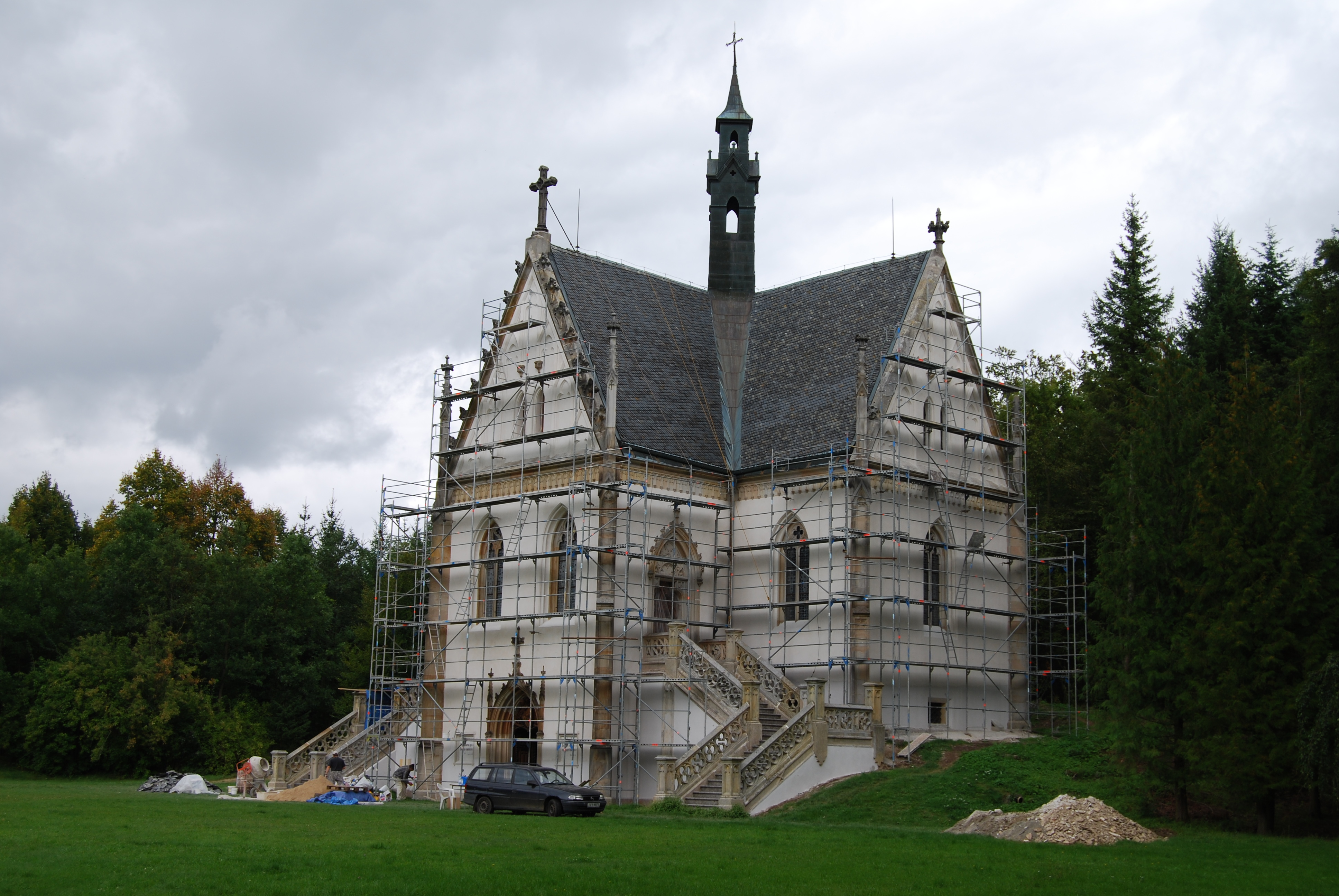 Schwanzerberská hrobka v rekonstrukci. Orlík nad Vltavou. Okres Písek. Česká republika.